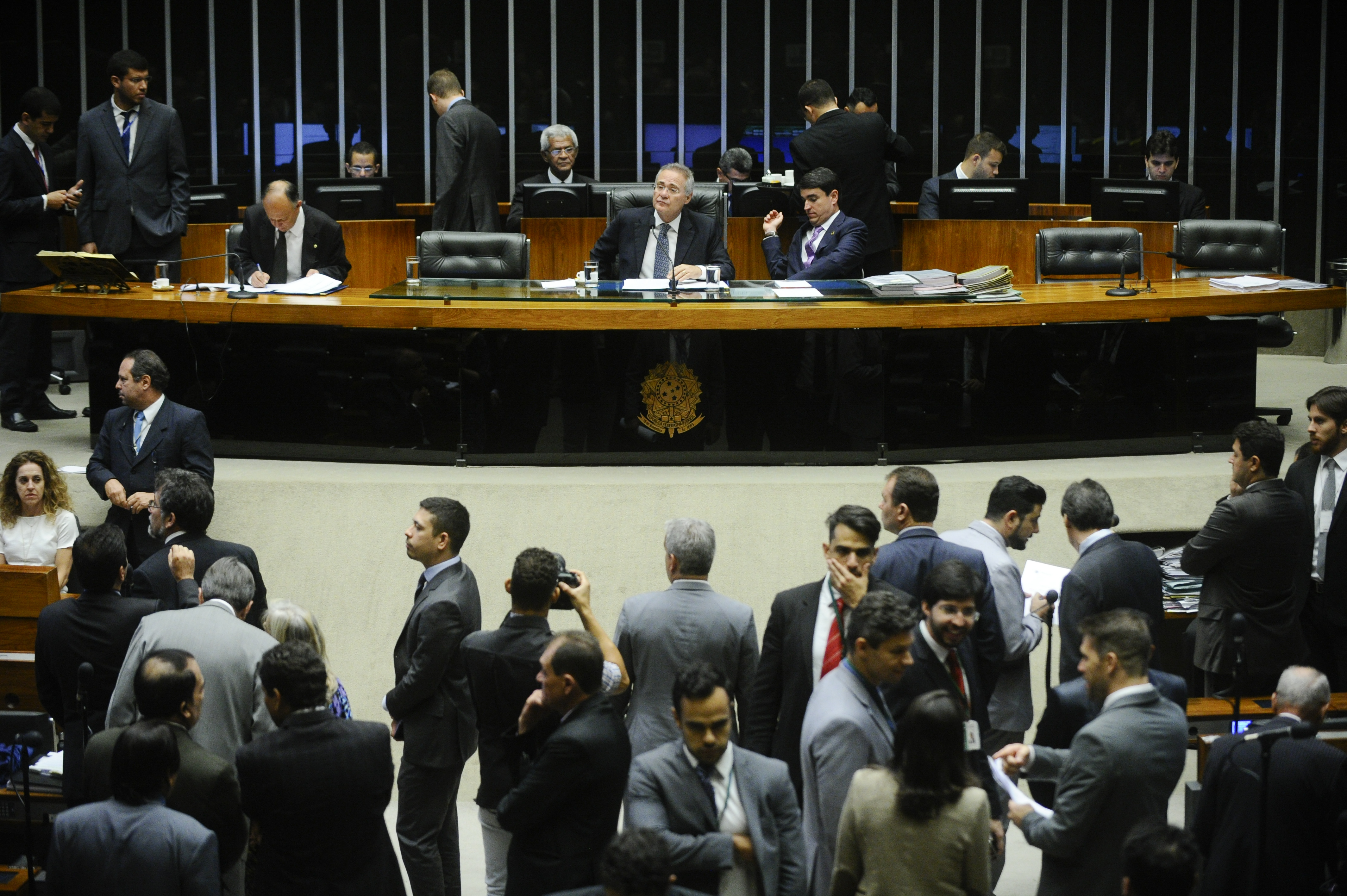 Plenário da Câmara dos Deputados durante sessão do Congresso Nacional para prosseguir na deliberação de vetos presidenciais e de dez projetos de lei. O quinto item da pauta é o PLN 8/2016, que libera para o Ministério da Educação crédito suplementar de R$ 1,1 bilhão, de onde deverão sair R$ 702 milhões para o Fundo de Financiamento Estudantil (Fies). A mesa: presidente do Senado, senador Renan Calheiros (PMDB-AL); secretÃ¡rio-geral da Mesa, Luiz Fernando Bandeira de Mello Filho. Foto: Marcos Oliveira/AgÃªncia Senado